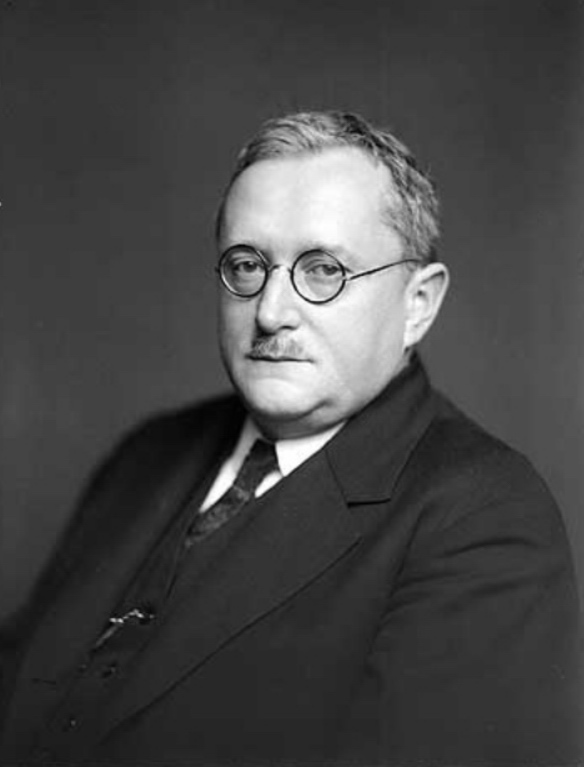 Jaroslav Milbauer